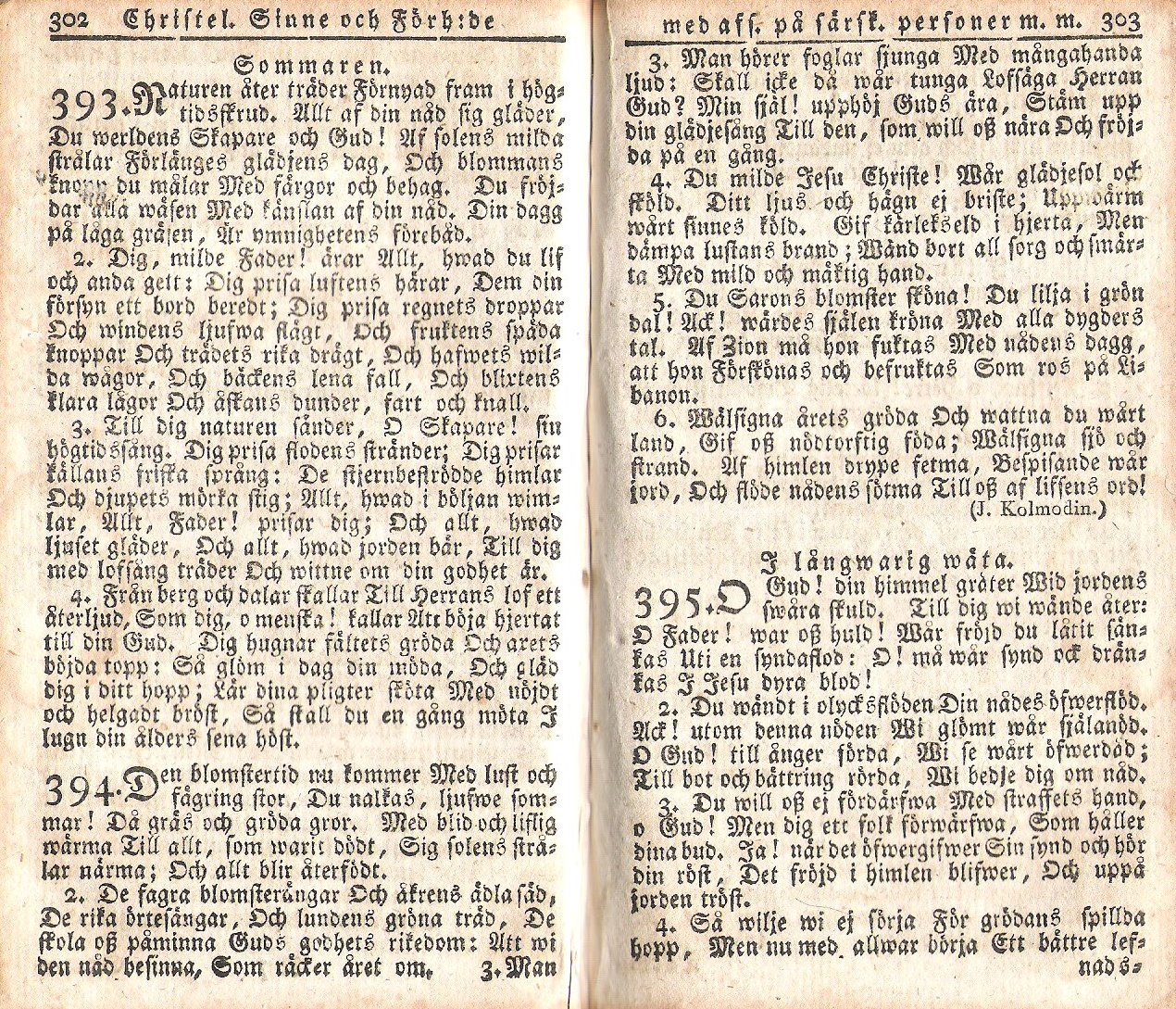 Den blomstertid nu kommer ur ett exemplar av 1819 års psalmbok, tryckt 1819.